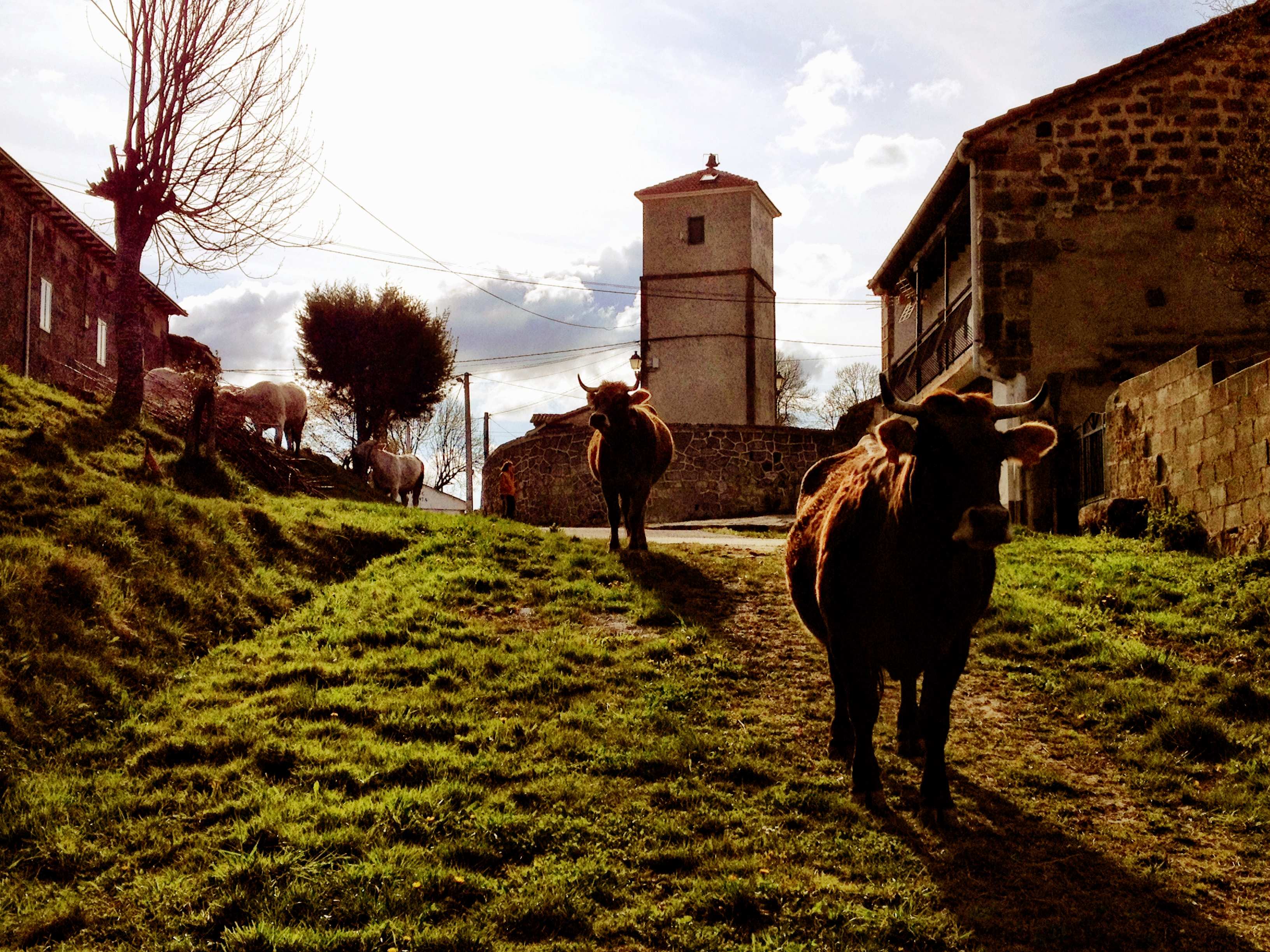 Varias vacas junto a la Torre del Reloj, en la plaza de Virtus.